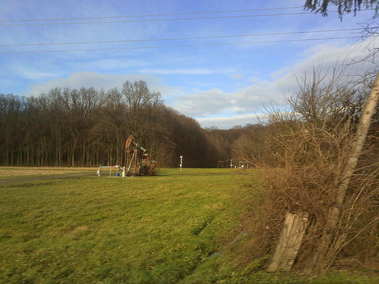 Crpilište nafte